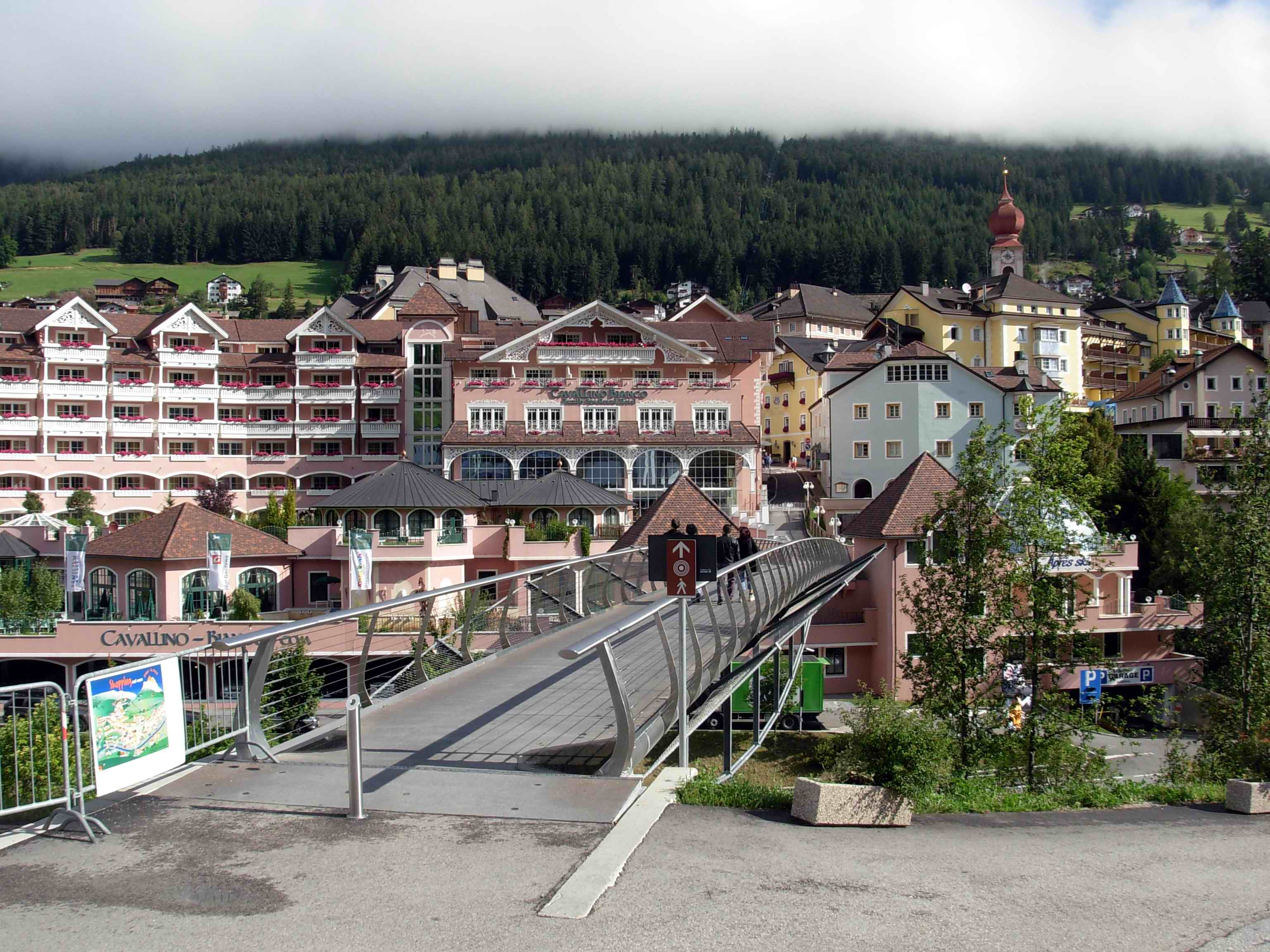 St. Ulrich in Gröden, Ortszentrum